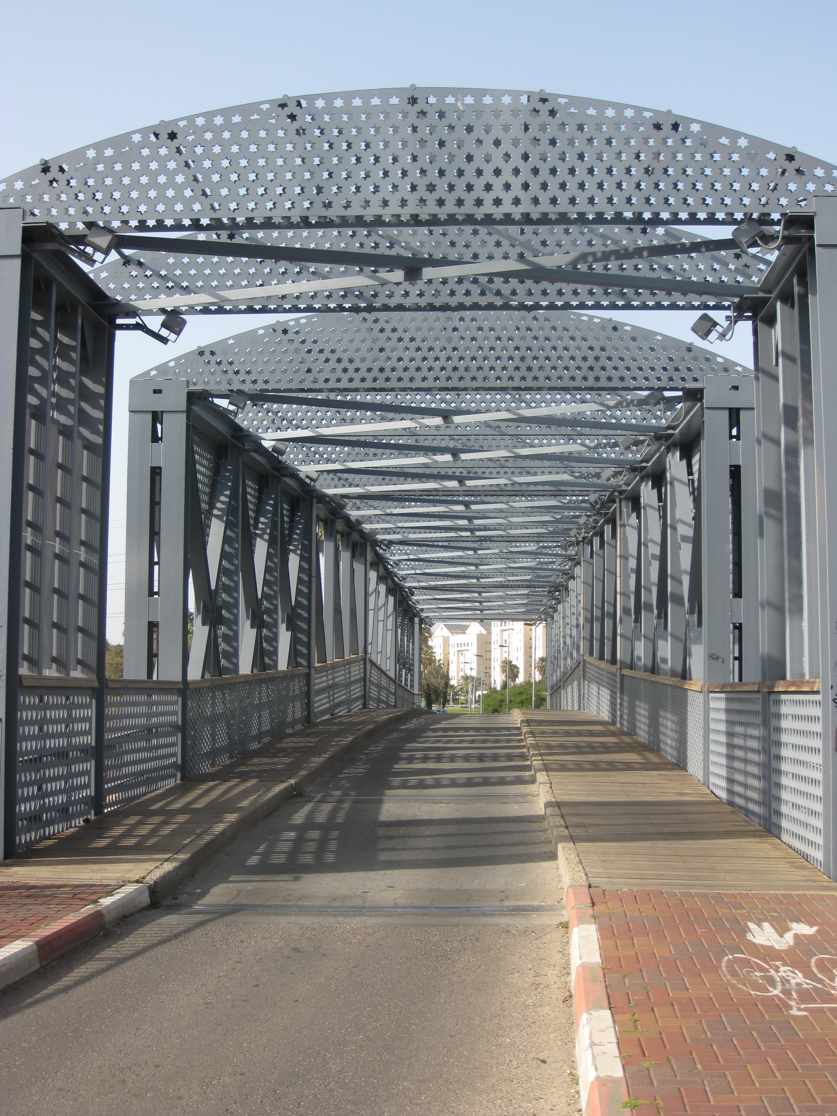 The Yarkon Park פארק הירקון גשר אוסישקין